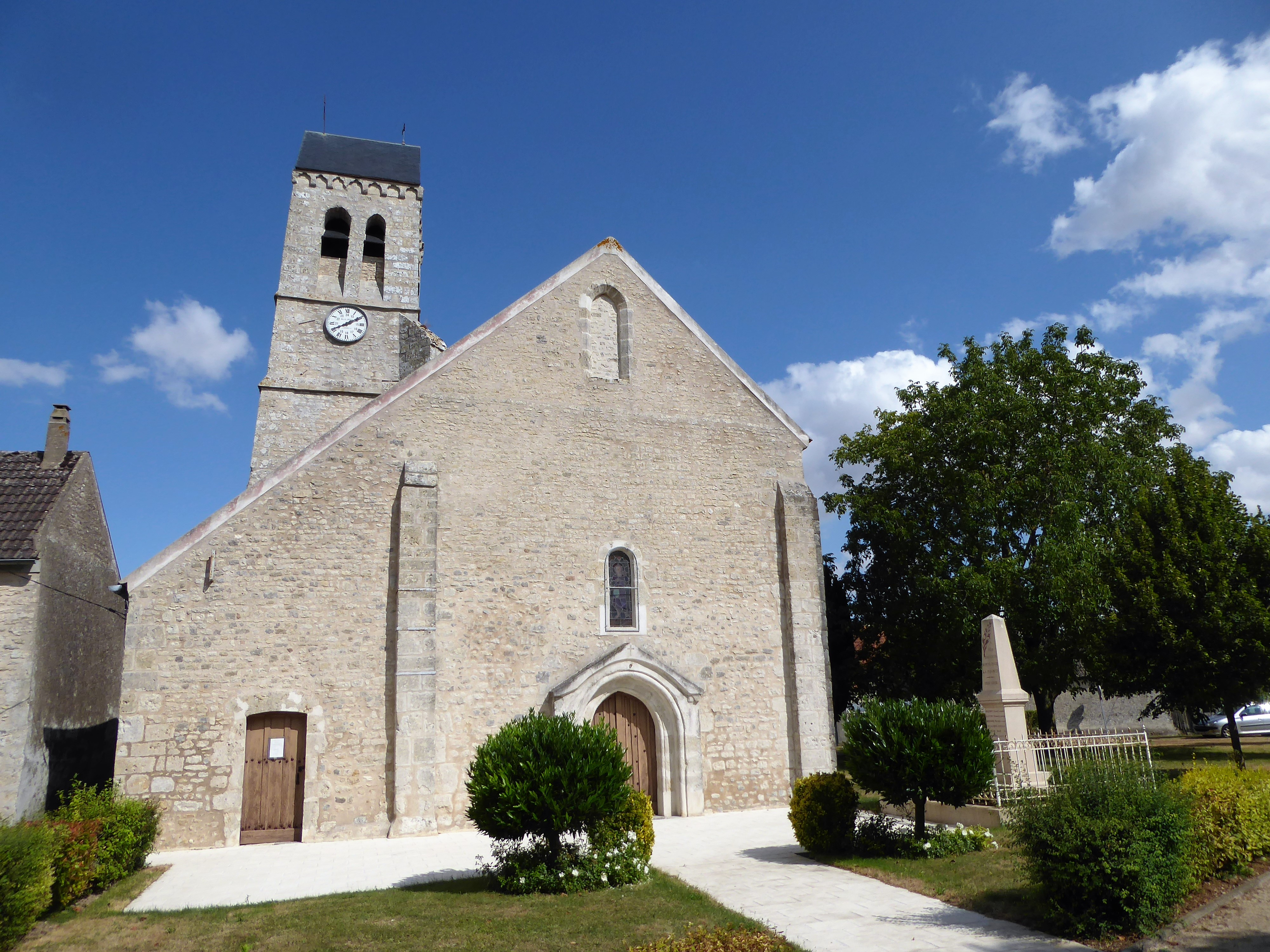 église Saint-Laurent et monument aux morts d'Intréville, Eure-et-Loir, France.